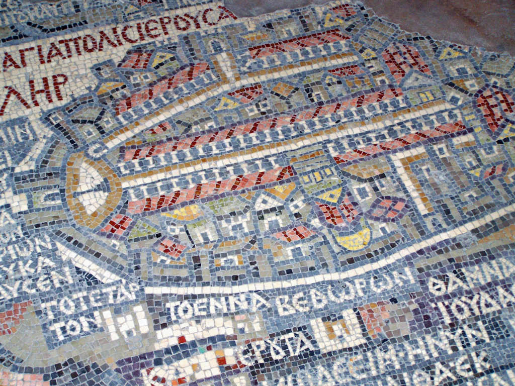 Mosaic floor in Madaba, Jordan